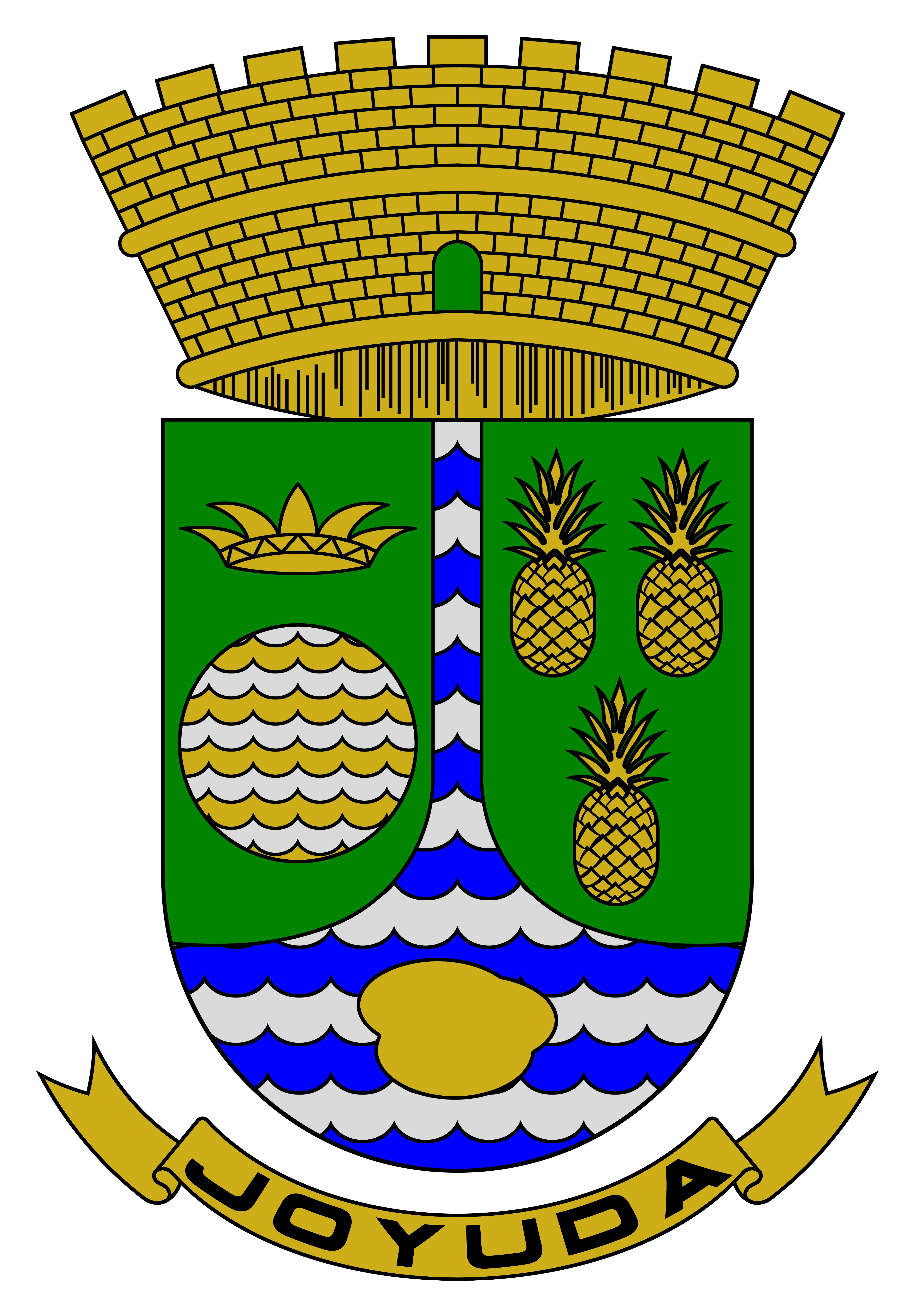 Escudo del Poblado Joyuda